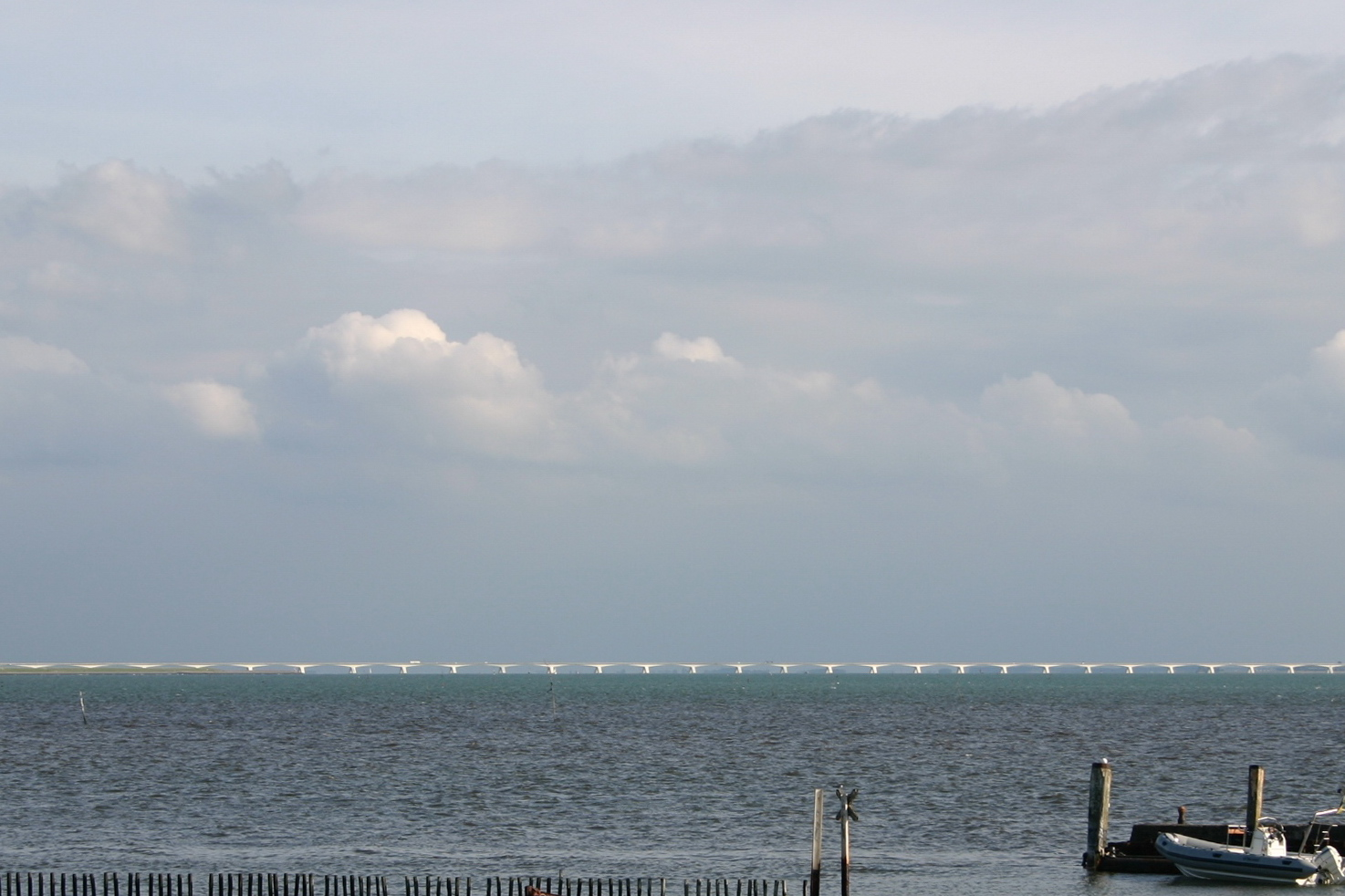 Pont de Zeelande Auteur: Les Meloures